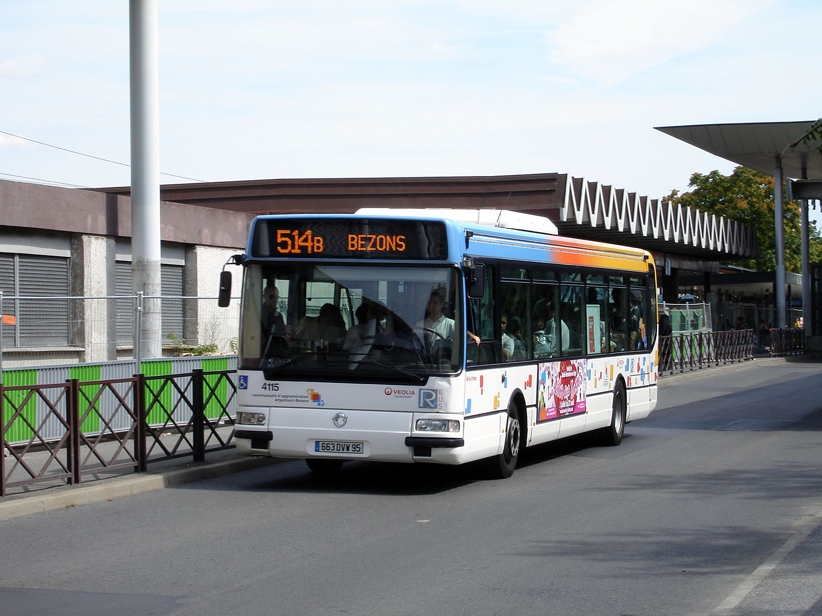 La gare d'Argenteuil, Val-d'Oise, France.